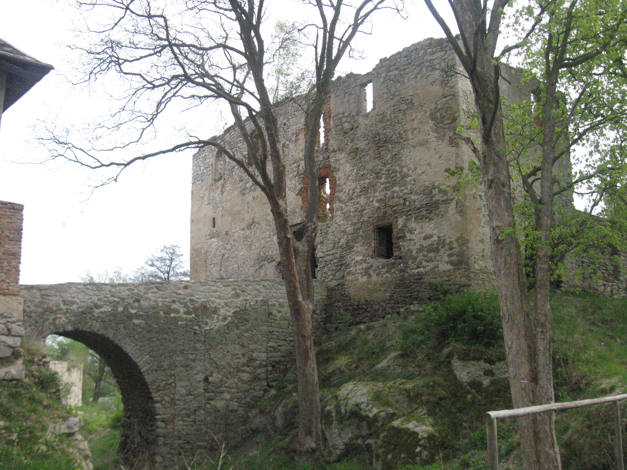 Starý Rybník: severní průčelí